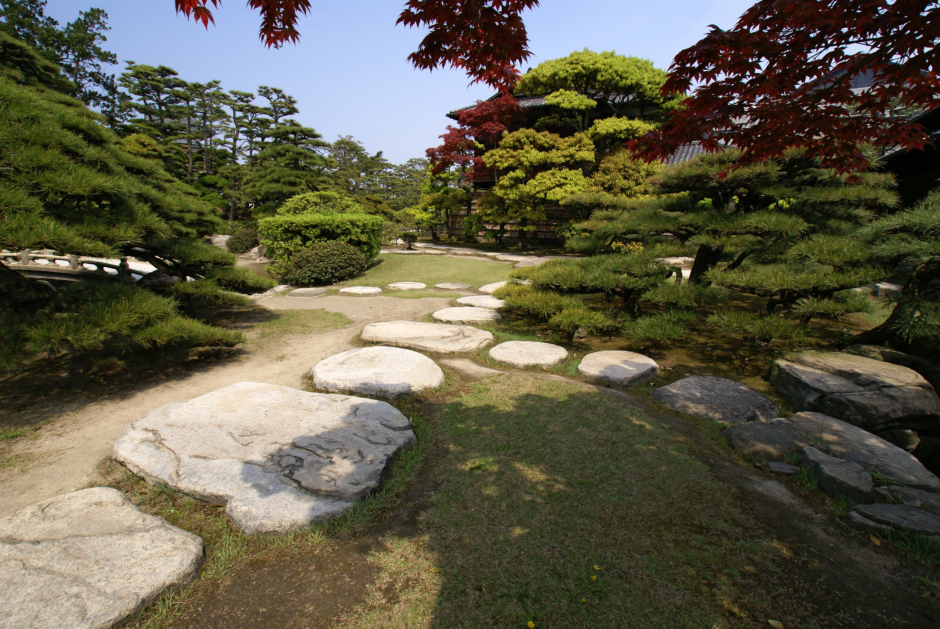 Takamatsu Castle (Tamamo park) in Takamatsu, Kagawa prefecture, Japan